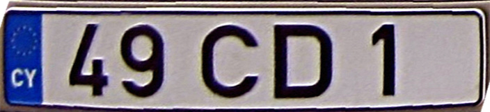 Cyprus dutch ambassador licenceplate